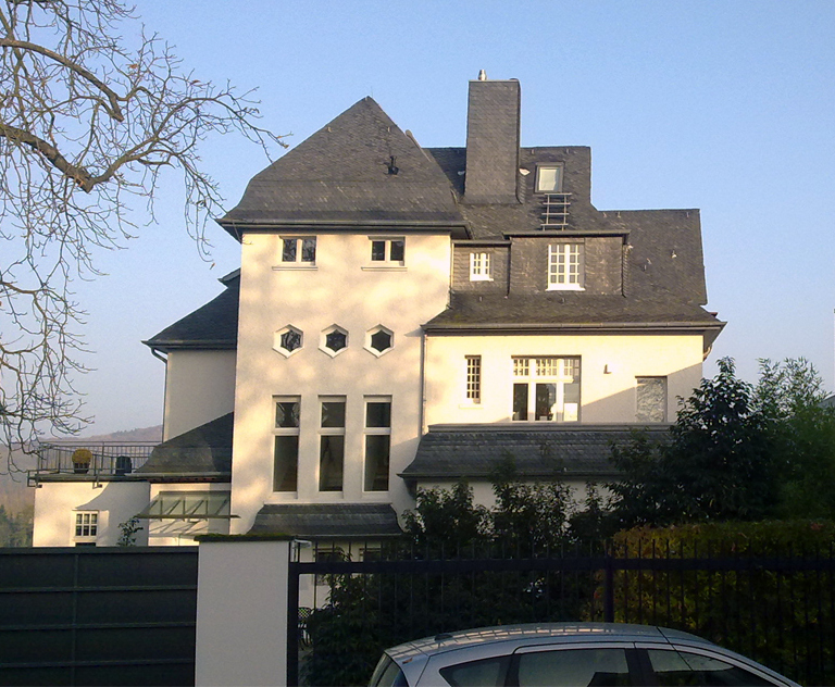 Straßenansicht der Villa von Meier (Dollendorfer Straße 10) in Plittersdorf, Bad Godesberg. Eintrag Nr. A 2271 in der Bonner Denkmalschutzliste